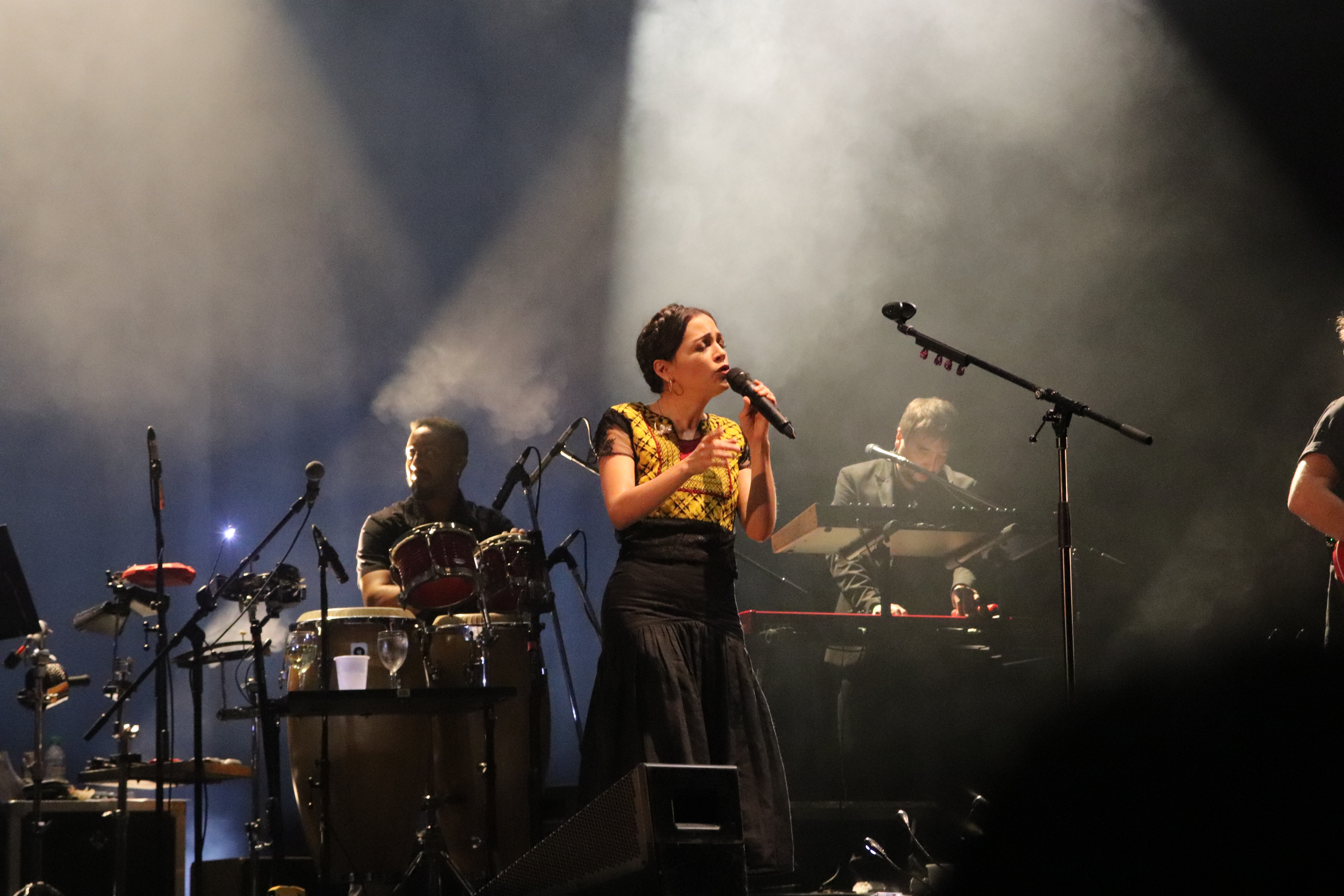 Recital de Natalia Lafourcade el 26 de Abril de 2018 en el Gran Rex